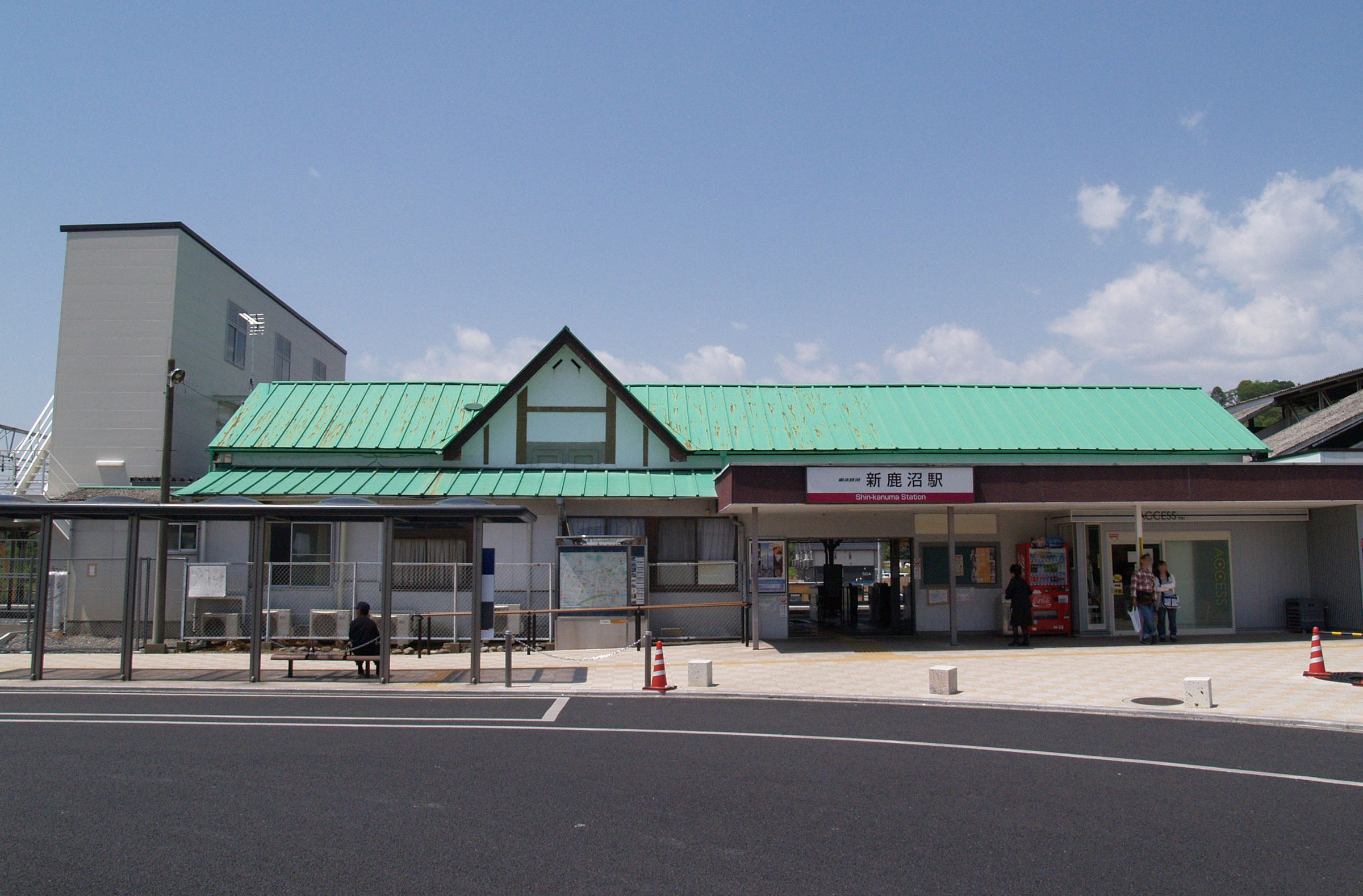 新鹿沼駅駅舎